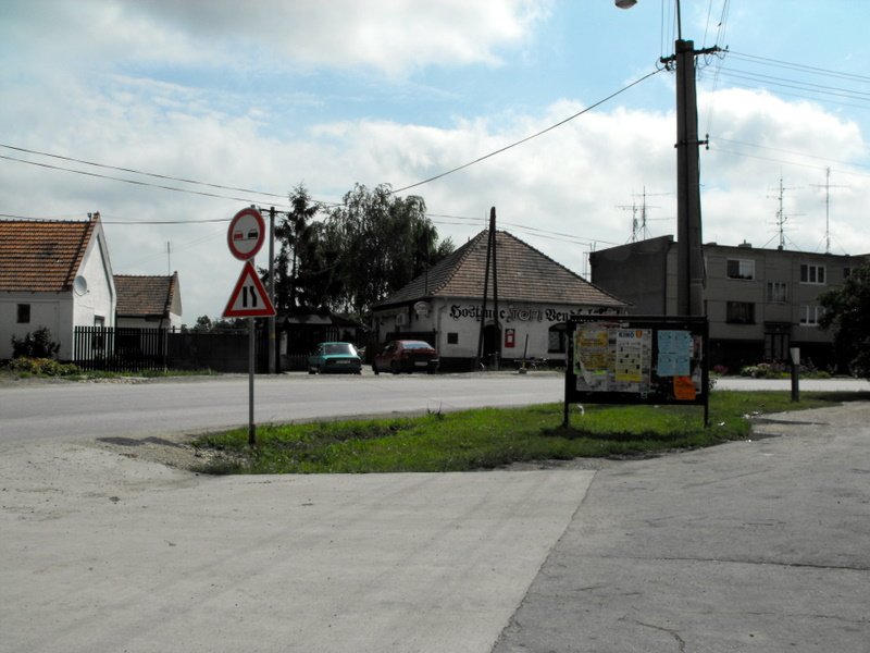 kosuty